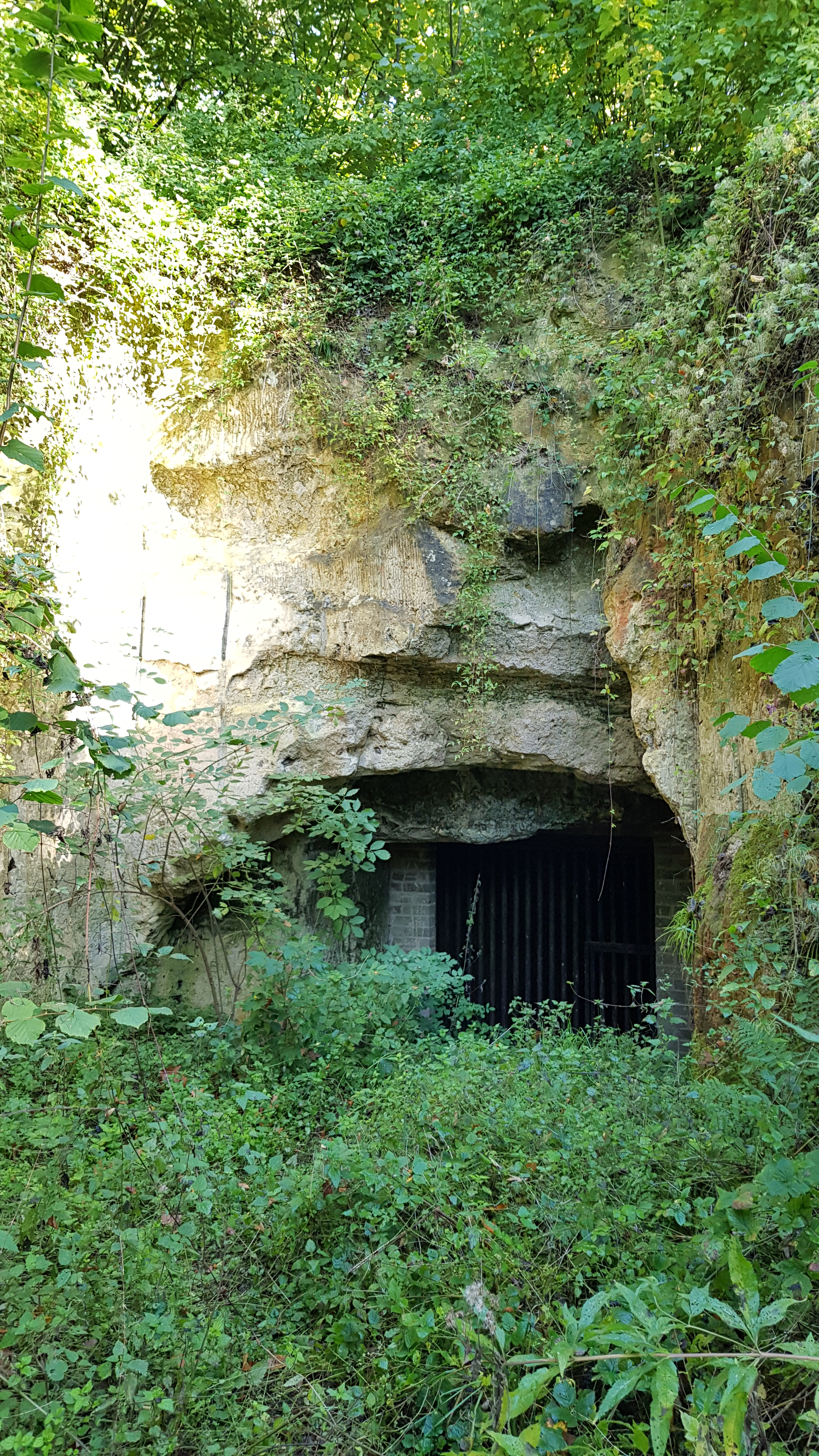 Savelsberggroeve, Gronsveld, Nederland